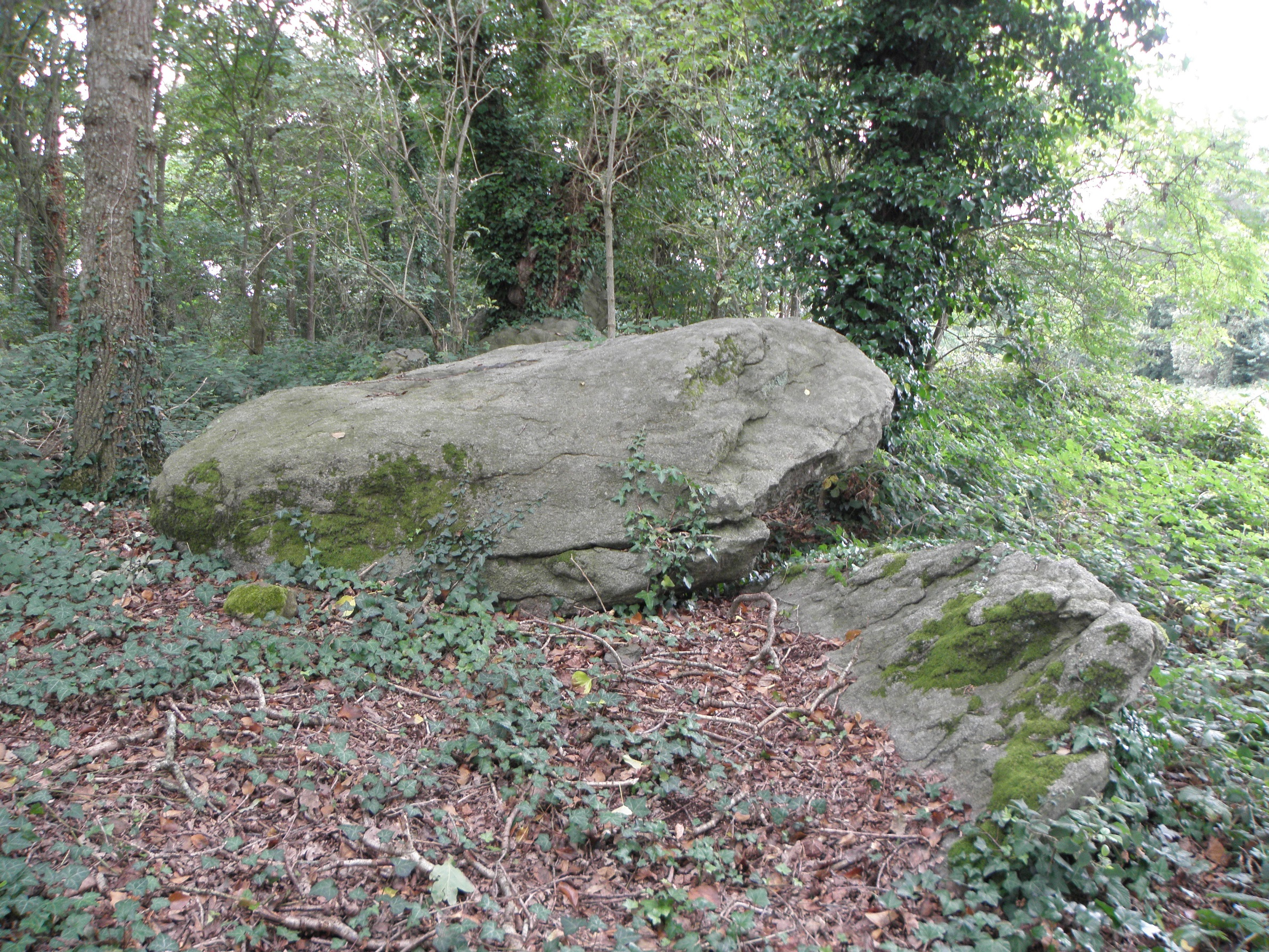 Allée couverte de Four-ès-Feins, commune de Miniac-Morvan (35).